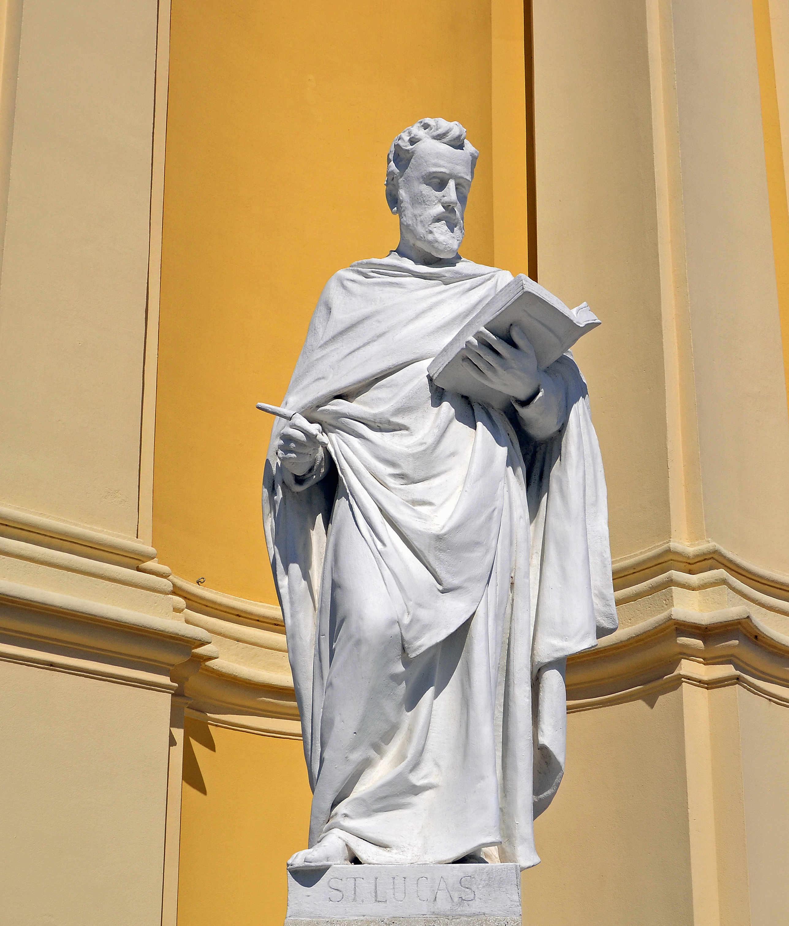 Kath. Pfarrkirche Kreuzerhöhung mit Kirchhof, sowie Terrassenanlage mit Figuren in Laxenburg: Evangelist Lukas